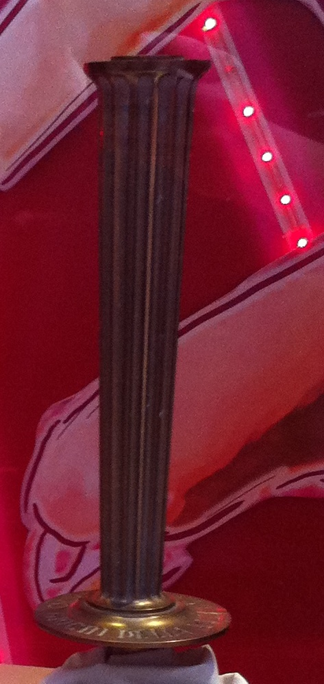 1960年夏季奧運火炬